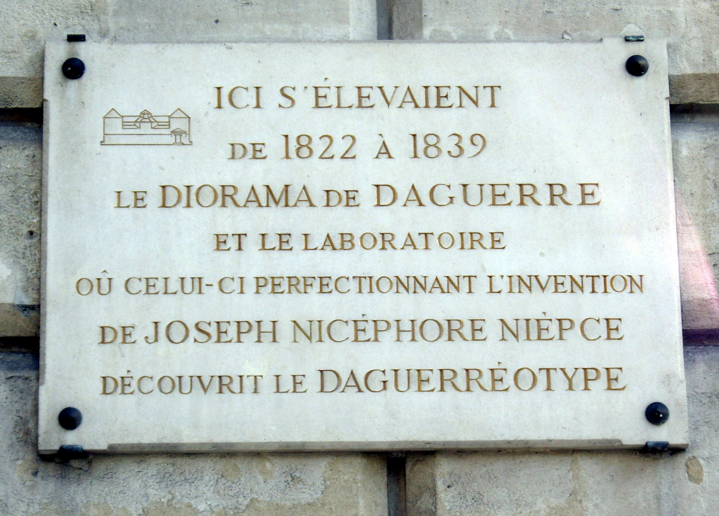 Plaque apposée sur le mur de la caserne Vérines, rue Léon-Jouhaux, Paris 10e, marquant l'emplacement du diorama et du laboratoire de Louis Daguerre, détruits par un incendie en 1839.Texte : « Ici s'élevait de 1822 à 1839 le diorama de Daguerre et le laboratoire où celui-ci perfectionnant l'invention de Joseph Nicéphore Niépce découvrit le daguerréotype »